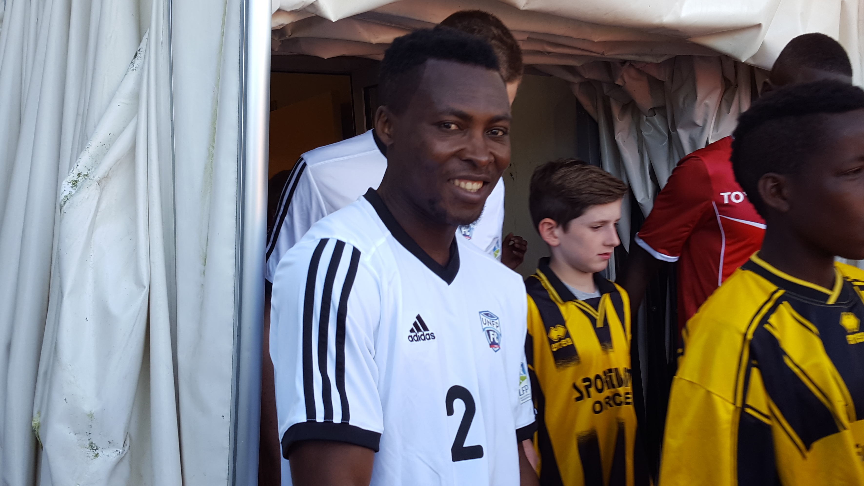 Mouri Ogounbiyi avant le match amical Valenciennes / UNFP FC, le 2 juillet 2016, au Stade des Navarres à Aniche.